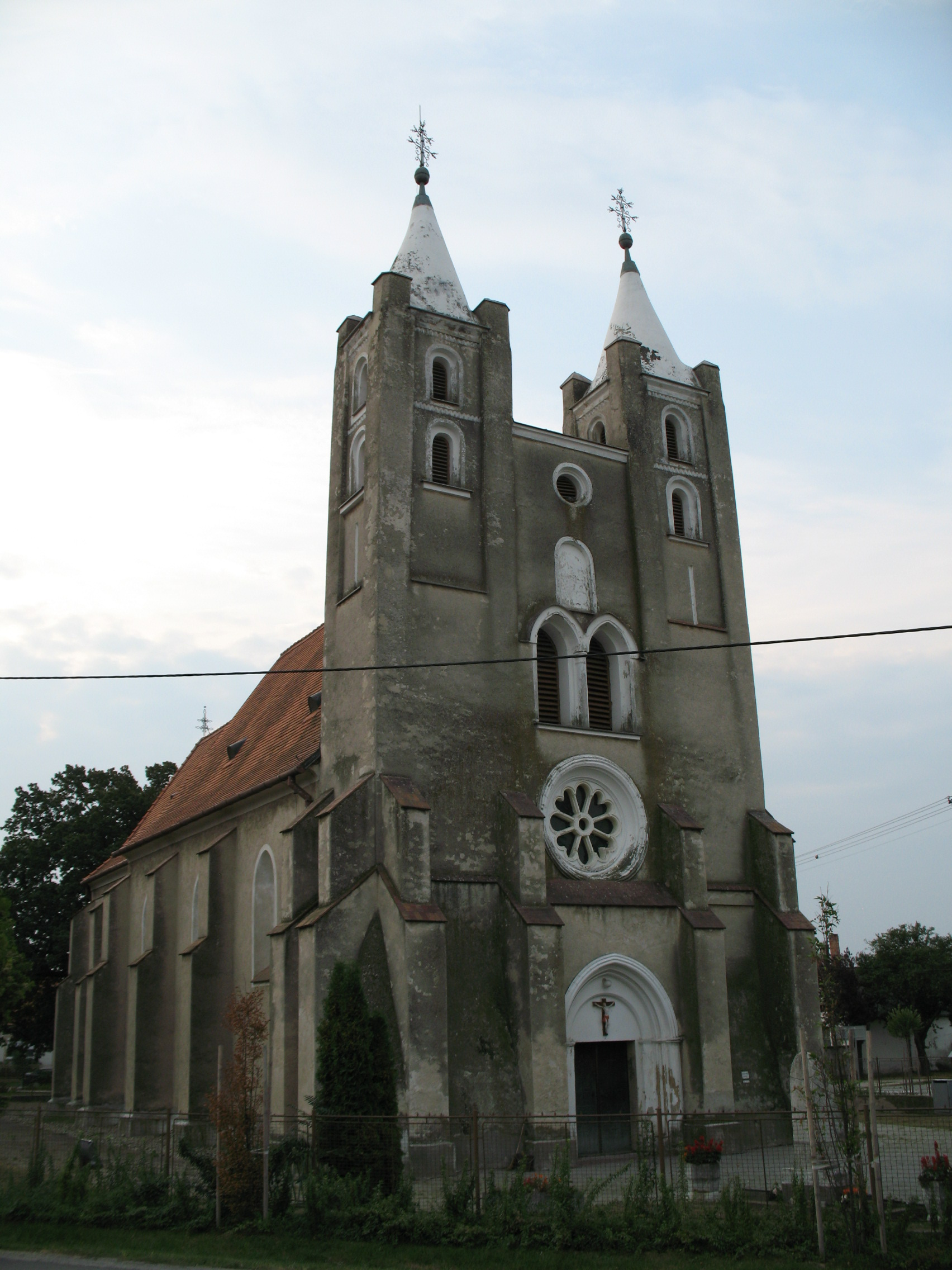 templom